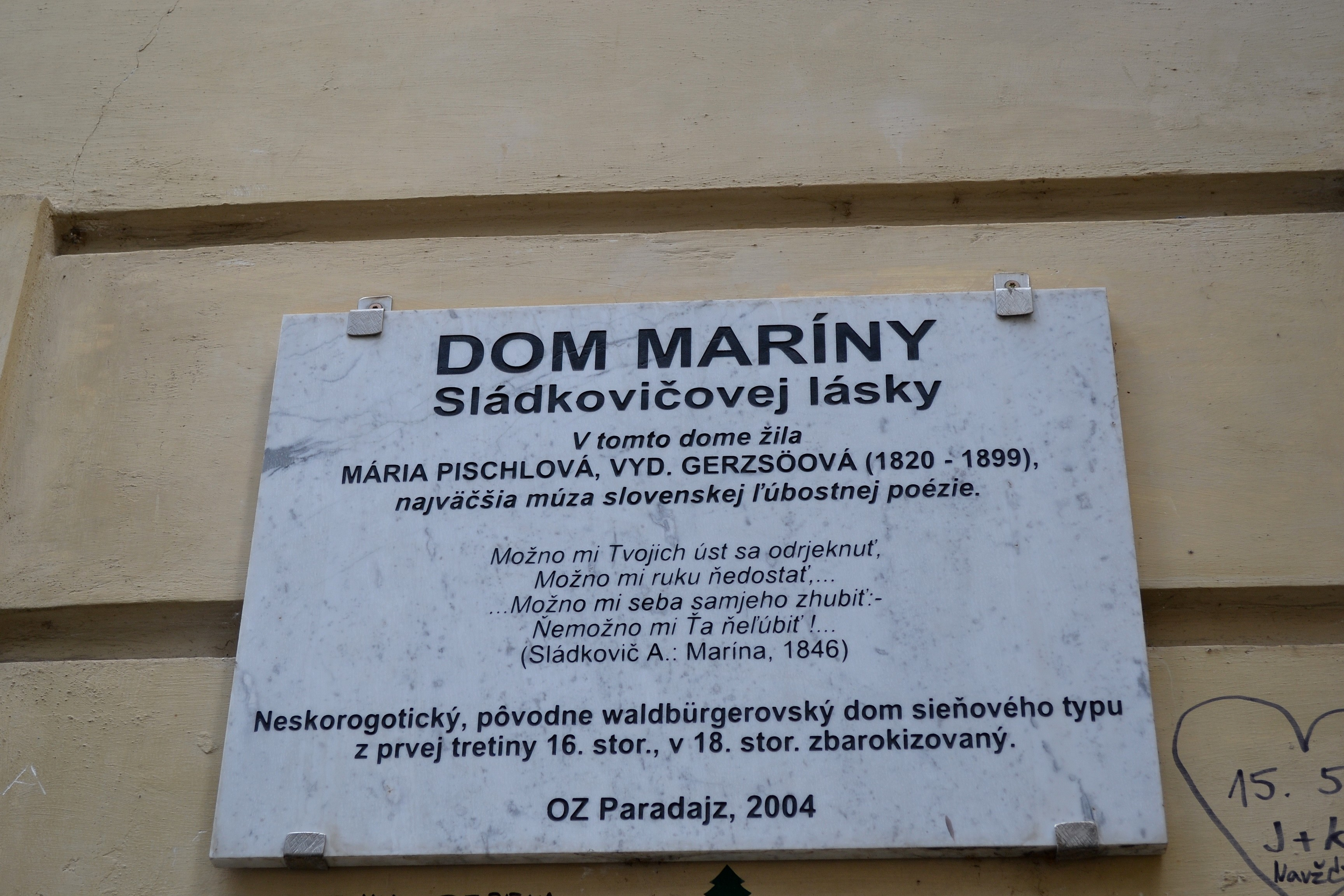 Pamätná tabuľa na Pischlovom dome obsahuje verše zo Sládkovičovej Maríny